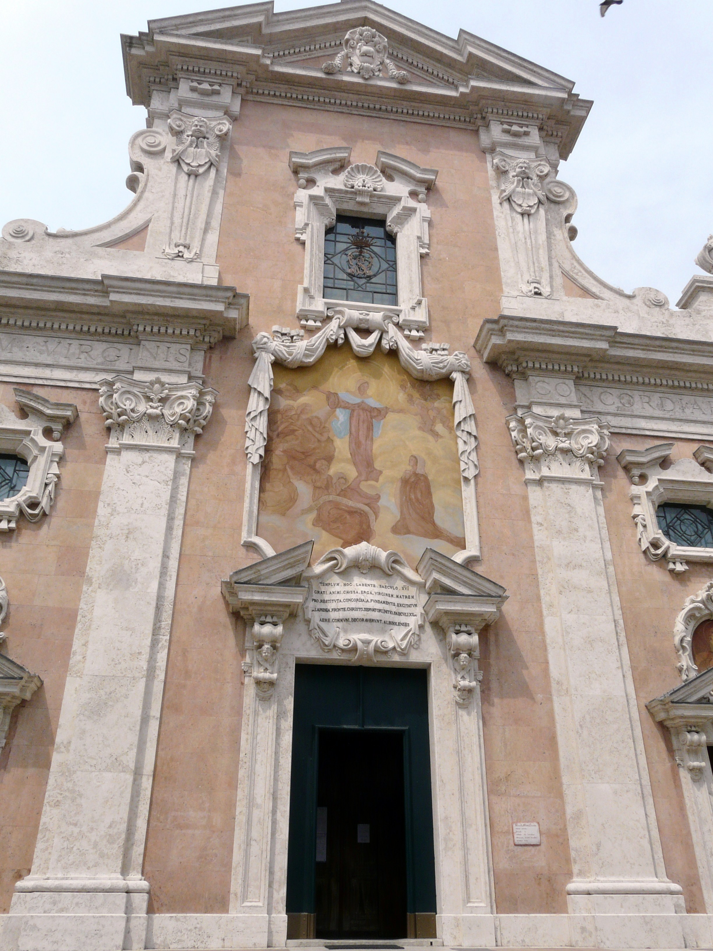 Facciata della chiesa di Nostra Signora della Concordia, Albissola Marina, Liguria, Italia